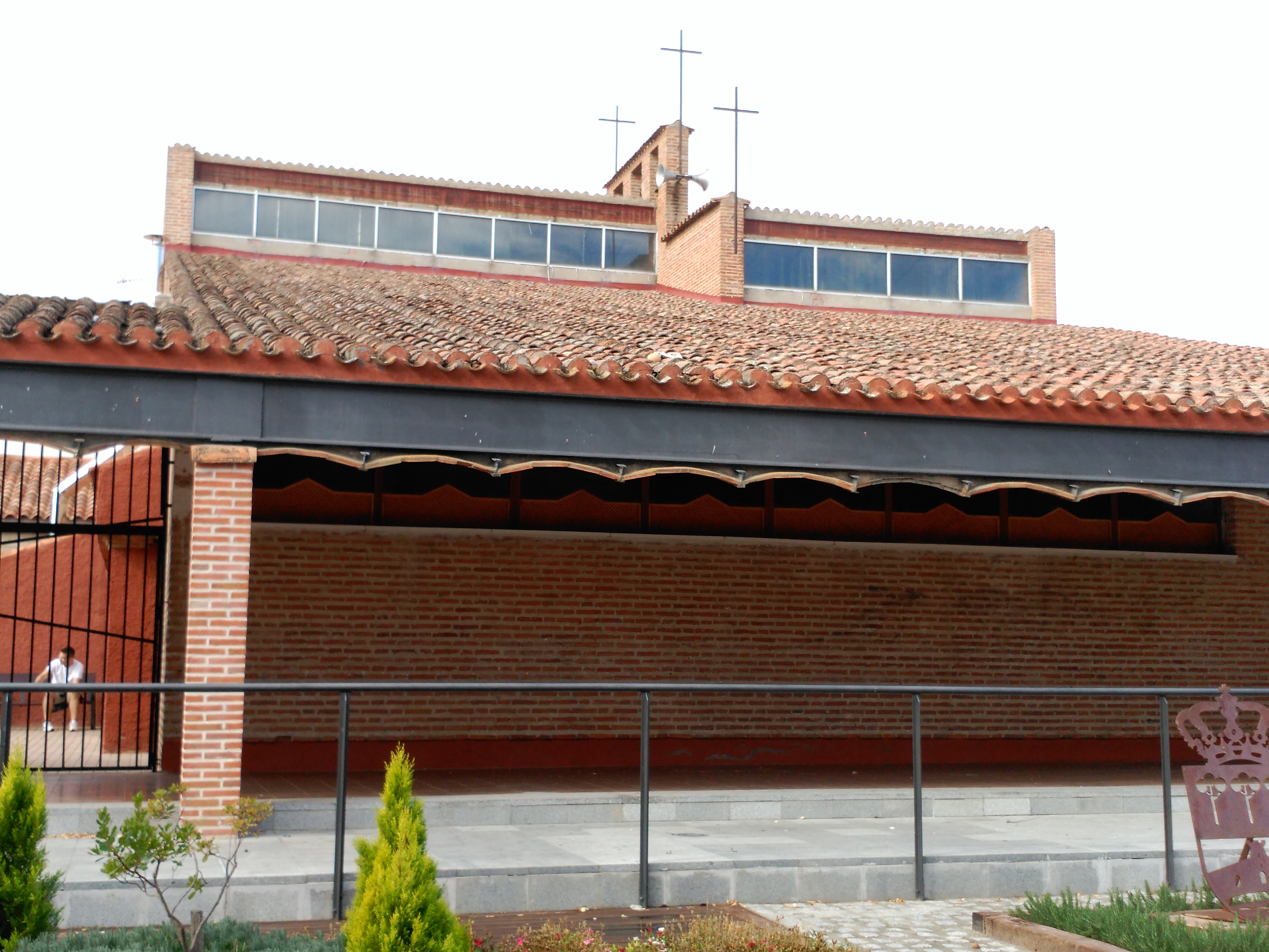 Parroquia de Nuestra Señora de las Nieves, en Viana de Cega (Valladolid).